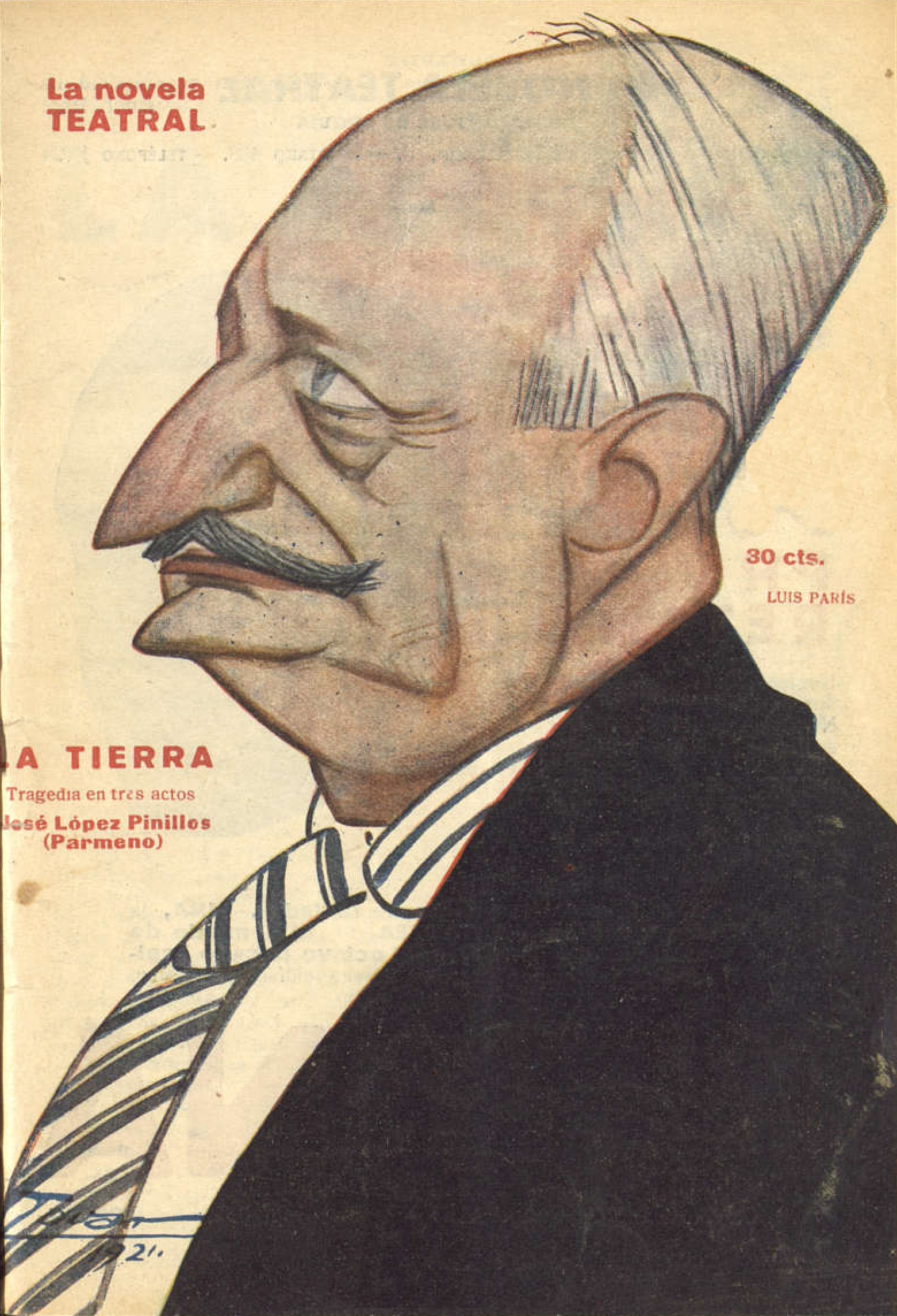 Caricatura de Luis París.